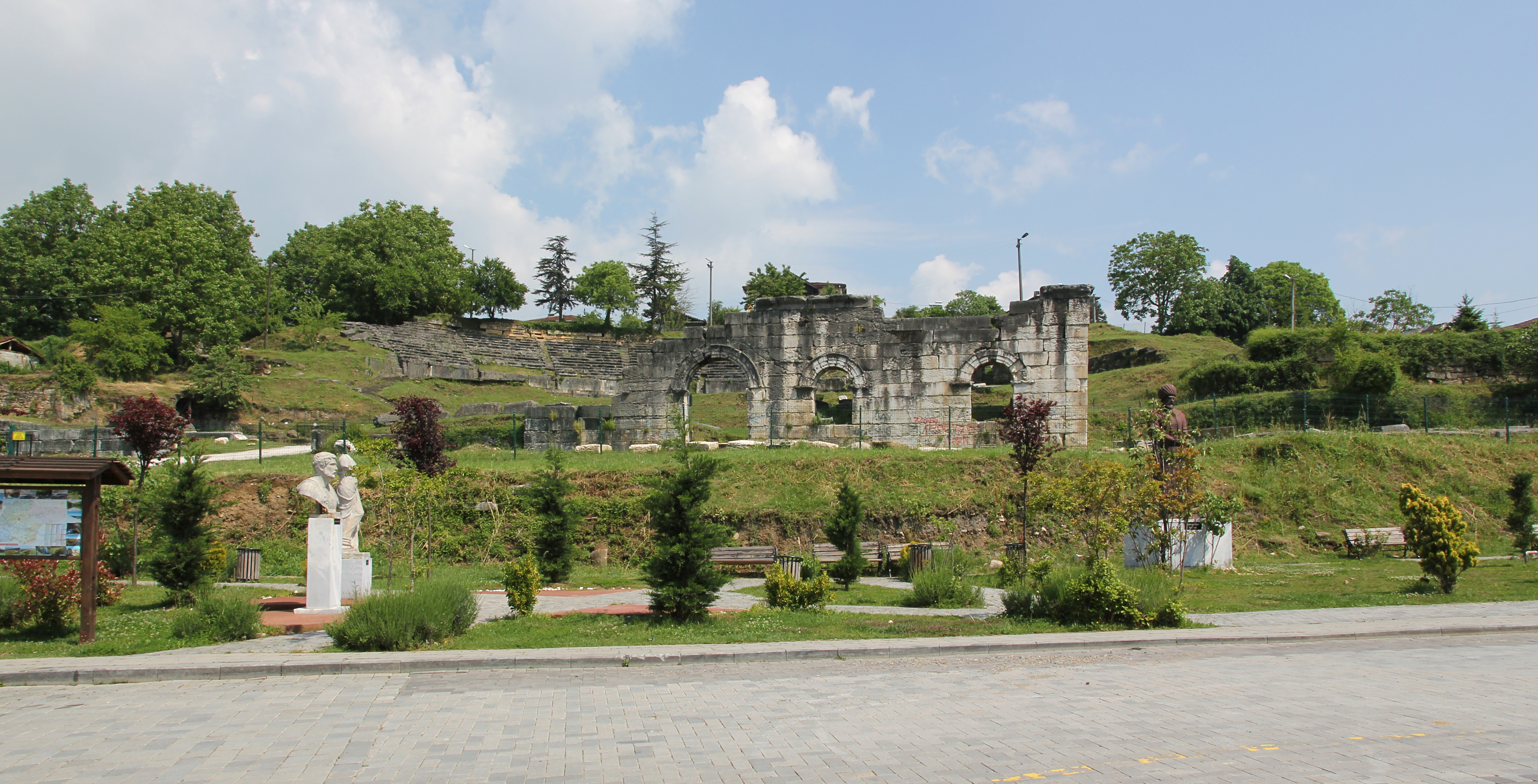 Prusias ad Hypium, antike bithynische Stadt bei Konuralp, Provinz Düzce, Nordwesttürkei, Theater mit Bühnengebäude